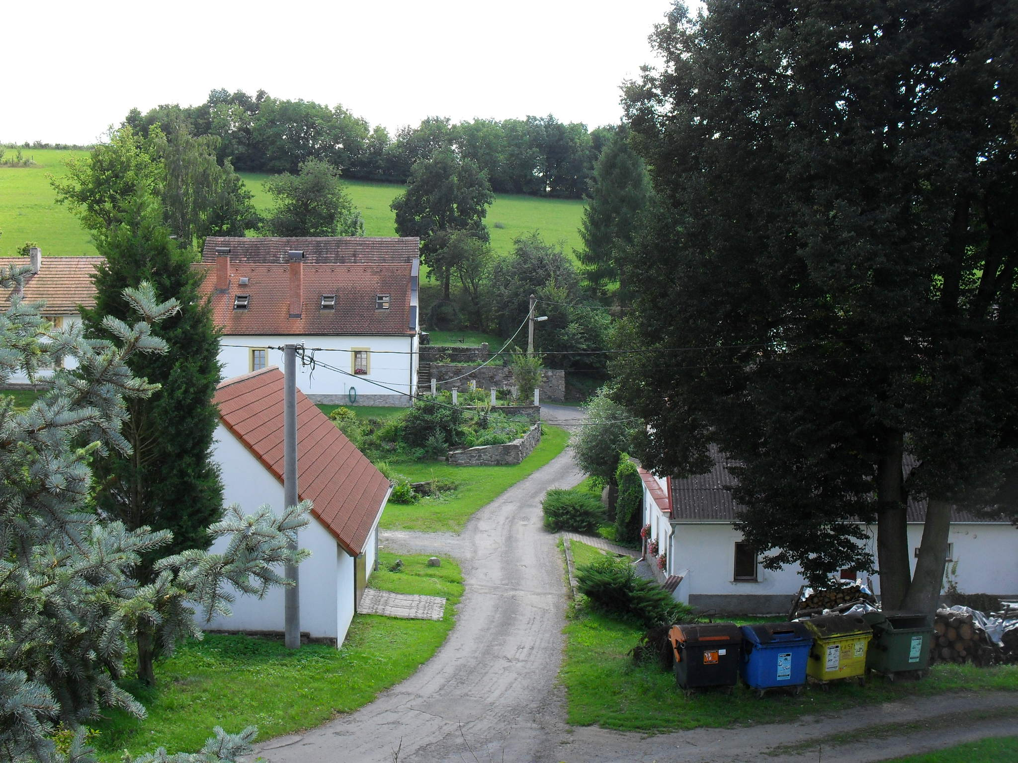 Pohled na Žíňany, část obce Soběhrdy